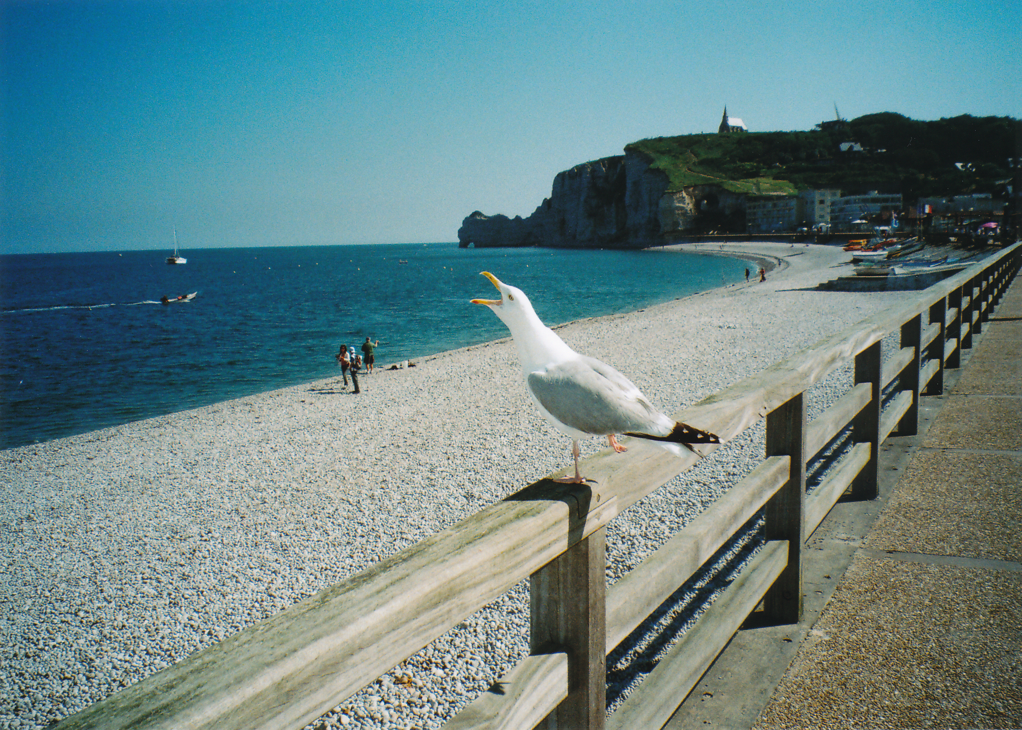 Der Kiesel-Strand von Etretat - nebst schreiender Silbermöwe im Vordergrund Datum: 06/2009 Urheber: Michael Pfeiffer Quelle: privates Fotoalbum des Urhebers